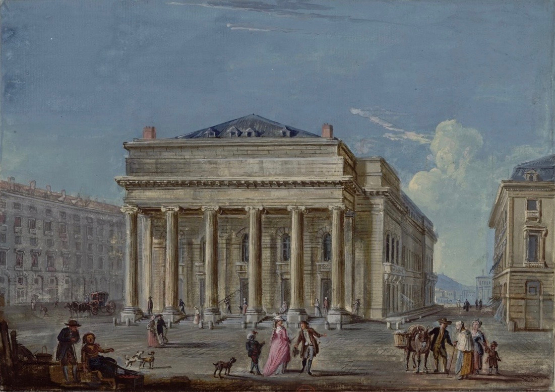 Jean-Baptiste Lallemand (1716–1803): Der 1783 eingeweihte Neubau der Comédie-Italienne (Salle Favart I) in Paris. Gouache, 16,5 x 23,2 cm. Bibliothèque nationale de France.